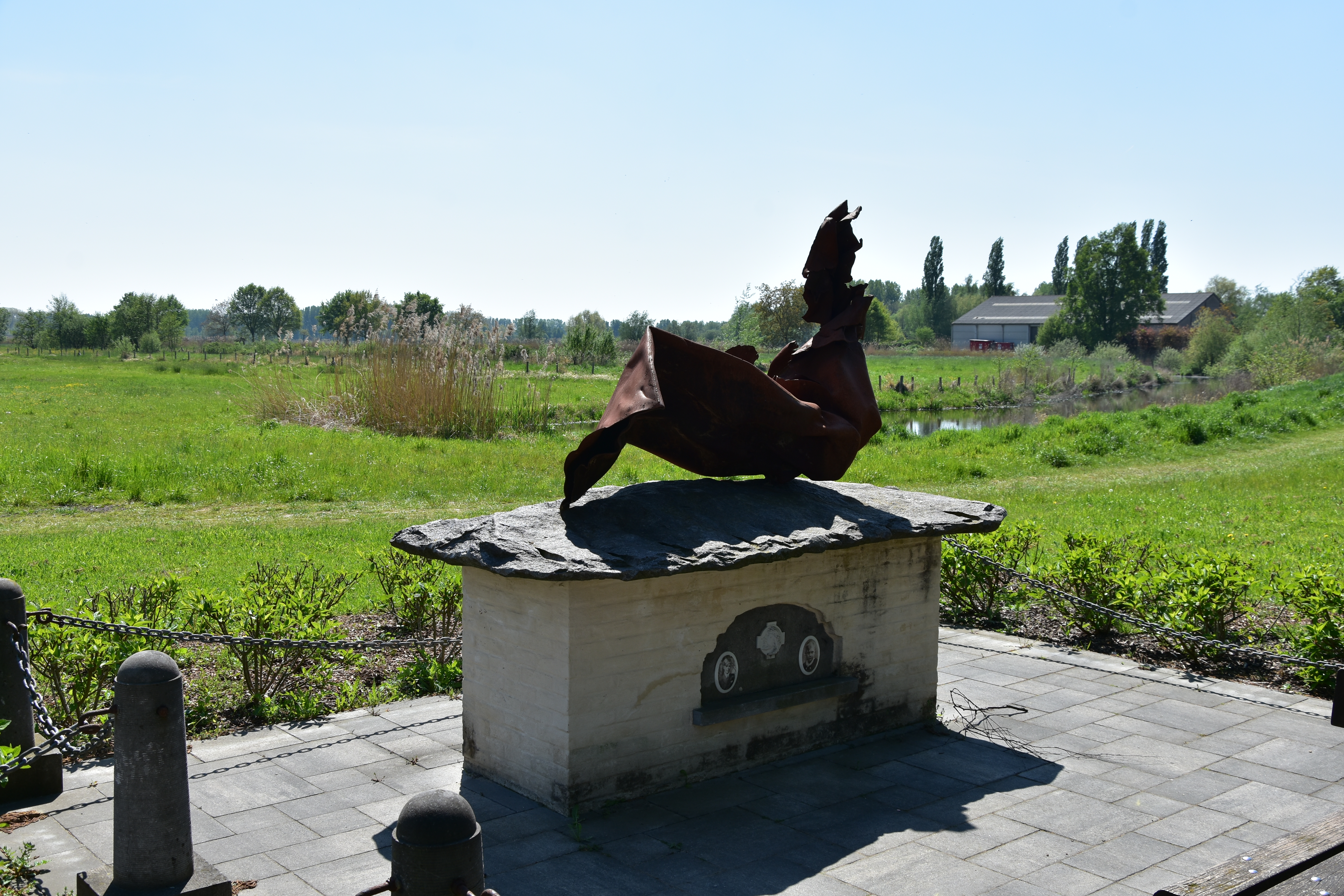 Kalken Mennestraat V-1 monument 23-04-2020 13-05-34